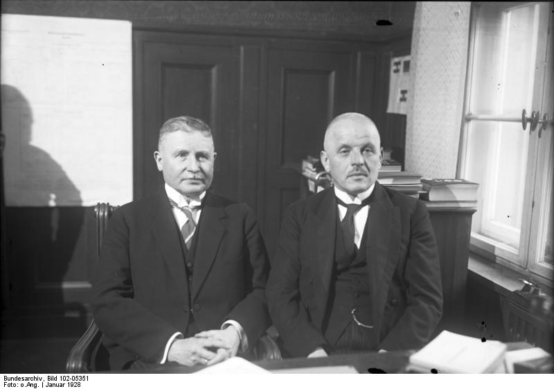 Die Einführung des neuen deutschen Reichswehrministers Groener in sein Amt! Der neue Reichswehrminster Groener (links) und der ehemalige Reichswehrminister Dr. Gessler (rechts) in Abschieds-Audienz im Reichswehrministerium in Berlin, Bendlerstrasse.